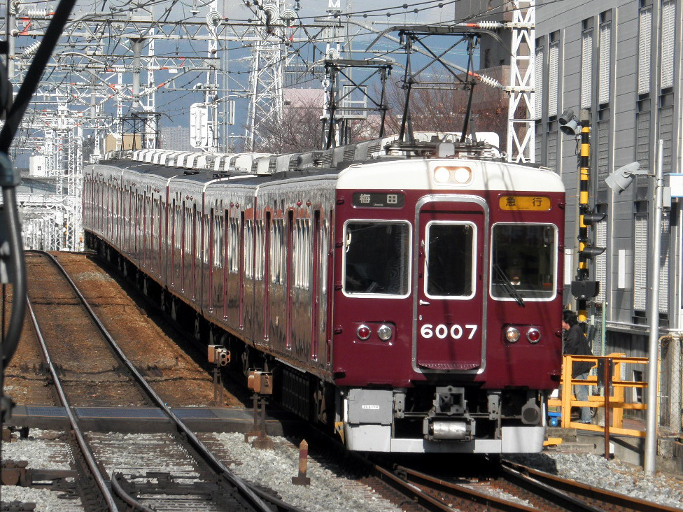 リニューアルされた6007F